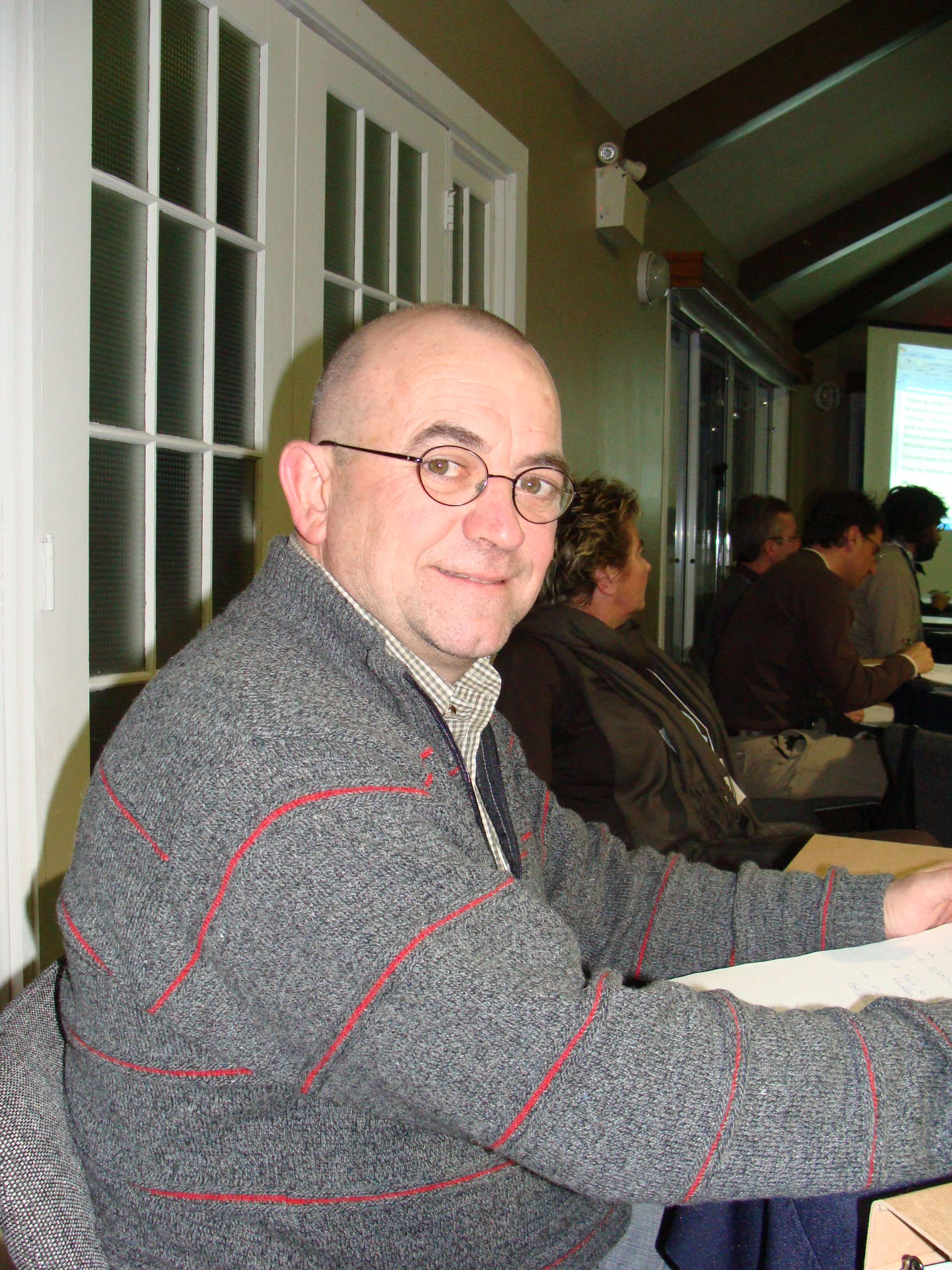 Personnalité de la CSN. Président de la CSN-Construction.